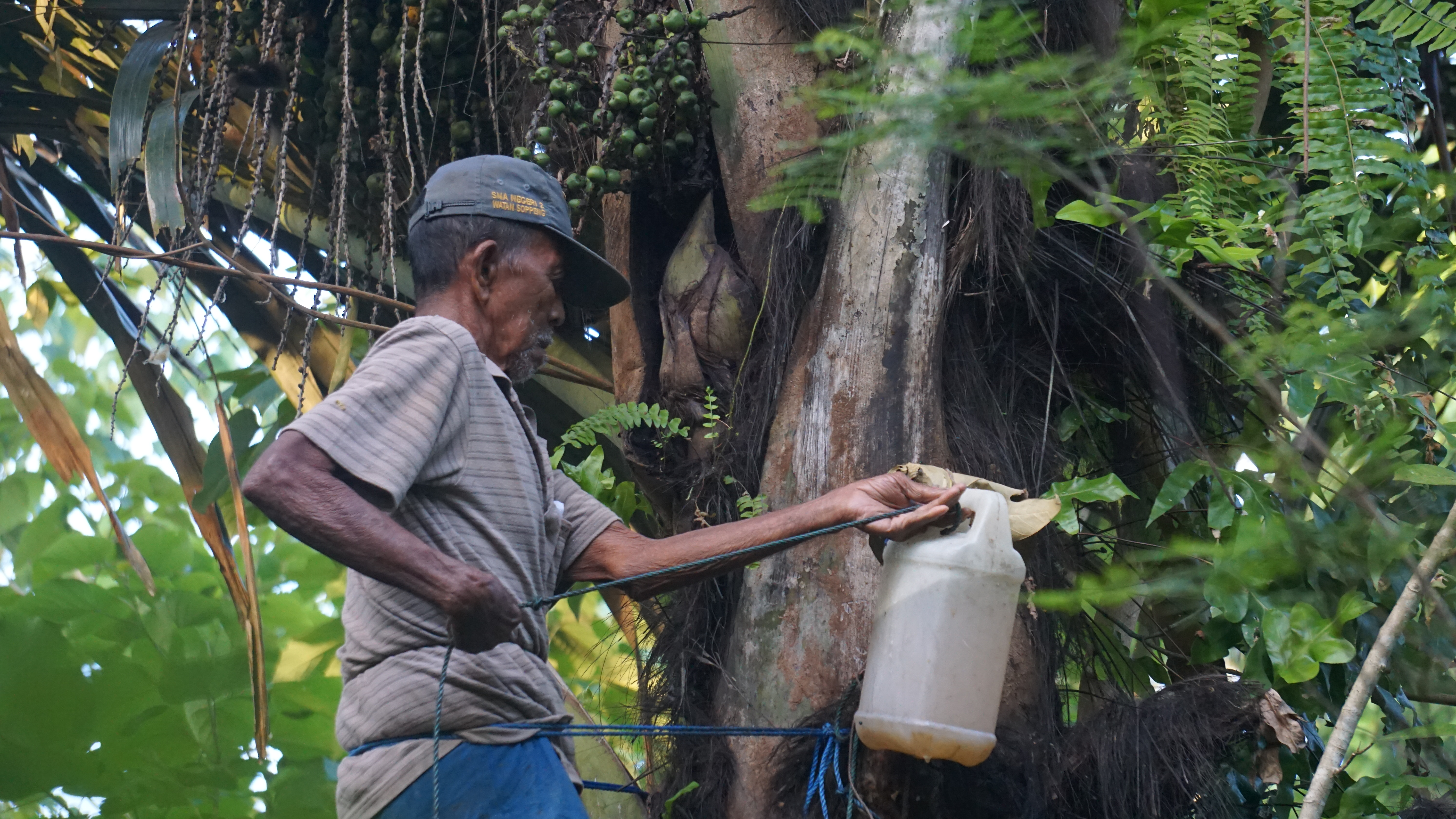 Ambo / Bapak / Kakek sedang memanen air pohon enau untuk dibuat menjadi gula merah.